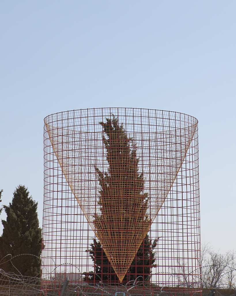 החרוט הגדול - פסל ברזל משנת 1985 מאת הפסלת הסביבתית המקסיקנית הלן אסקובדו בכניסה לשכונת ארמון הנציב, על גבי מאגר מים עגול Jerusalem Olei HaGardom street